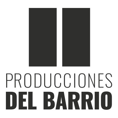 Este logo es la imagen que representa a Producciones del barrio